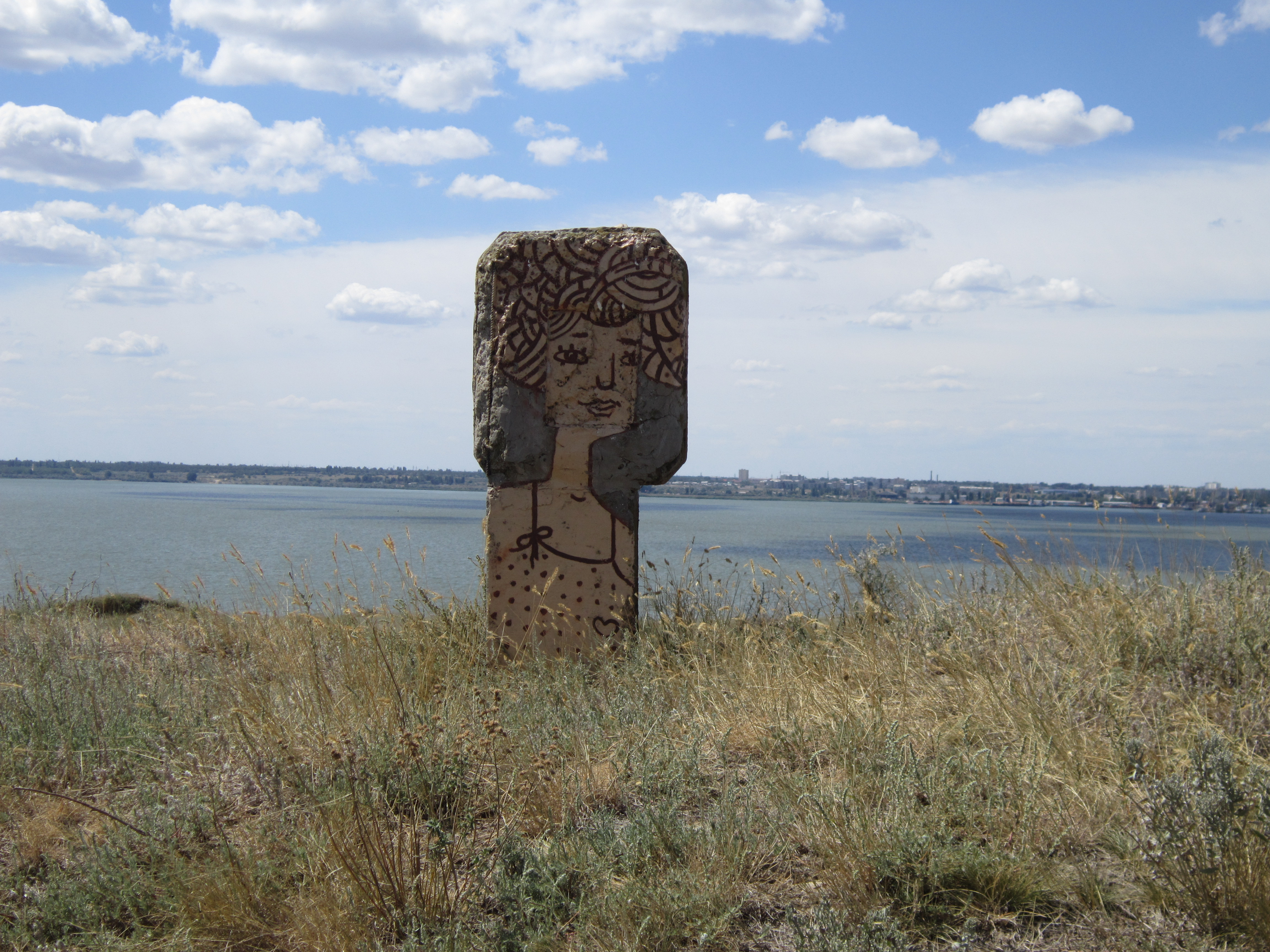 Античне місто Ніконій, село Роксолани, Овідіопольський район, Одеська область.